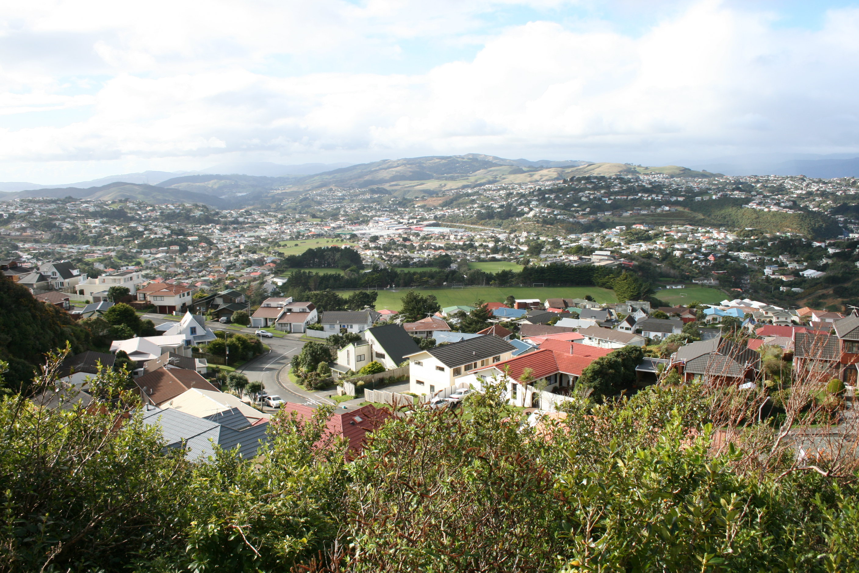 Johnsonville